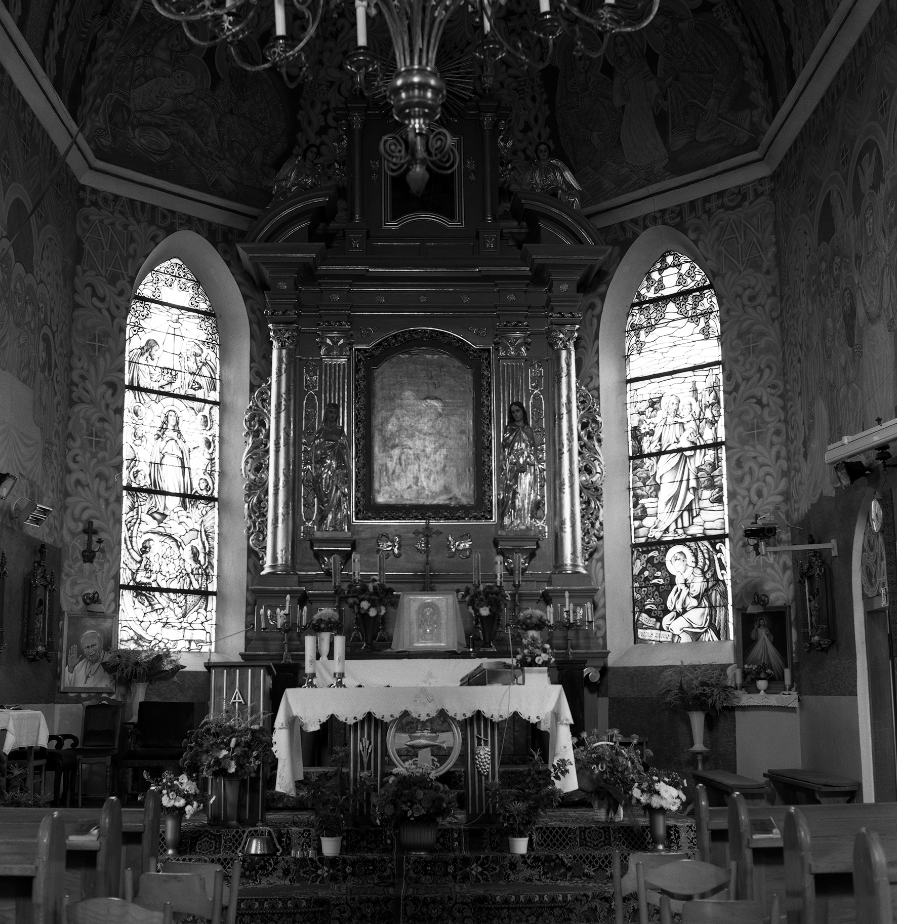 Bobin - rzymskokatolicki kościół parafialny pw. św. Anny, 1869